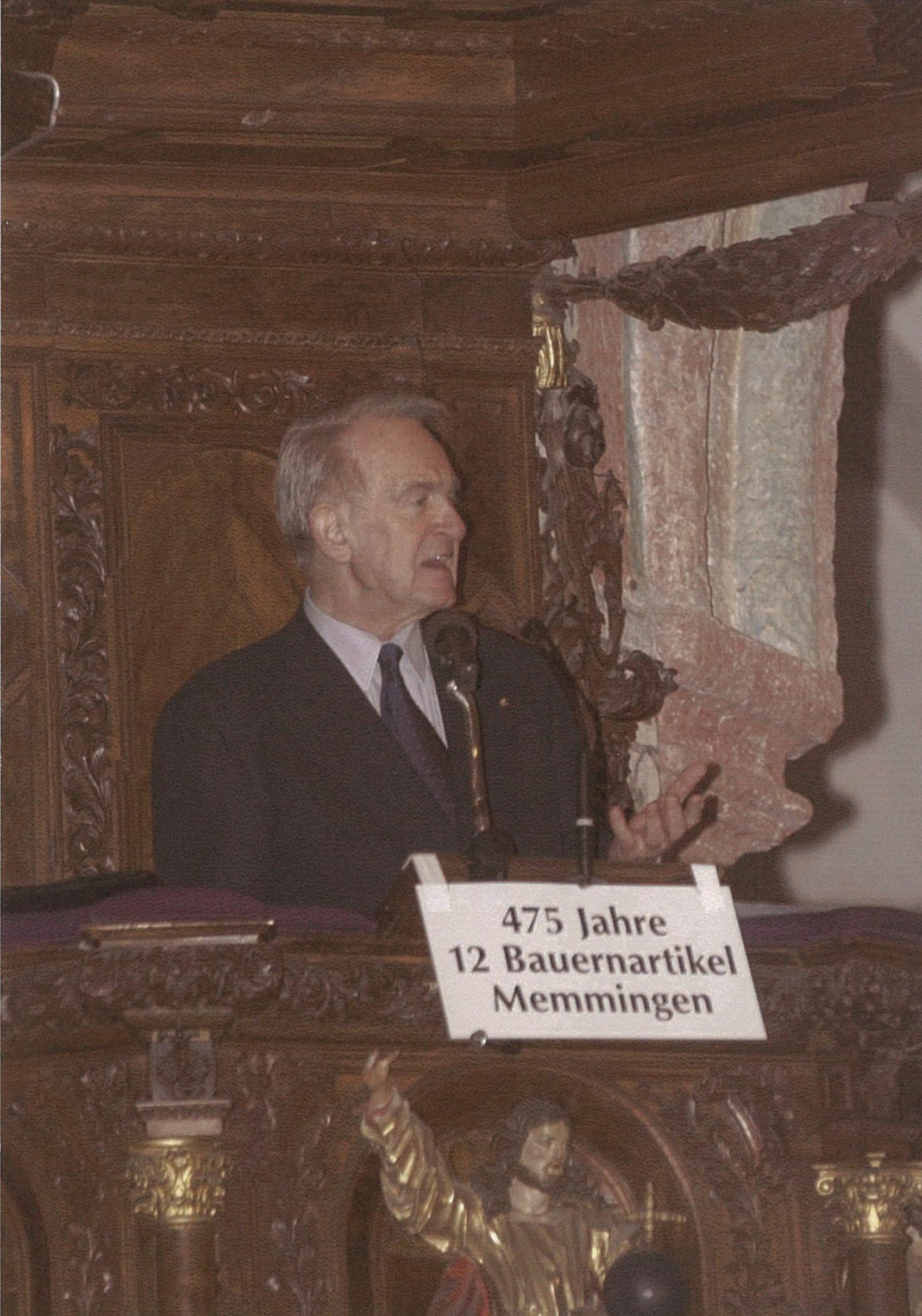 Laudatio vom ehemaligen Bundespräsident Johannes Rau anlässlich der Feier: "475 Jahre Zwölf Memminger Bauernartikel" in der St. Martinskirche in Memmingen